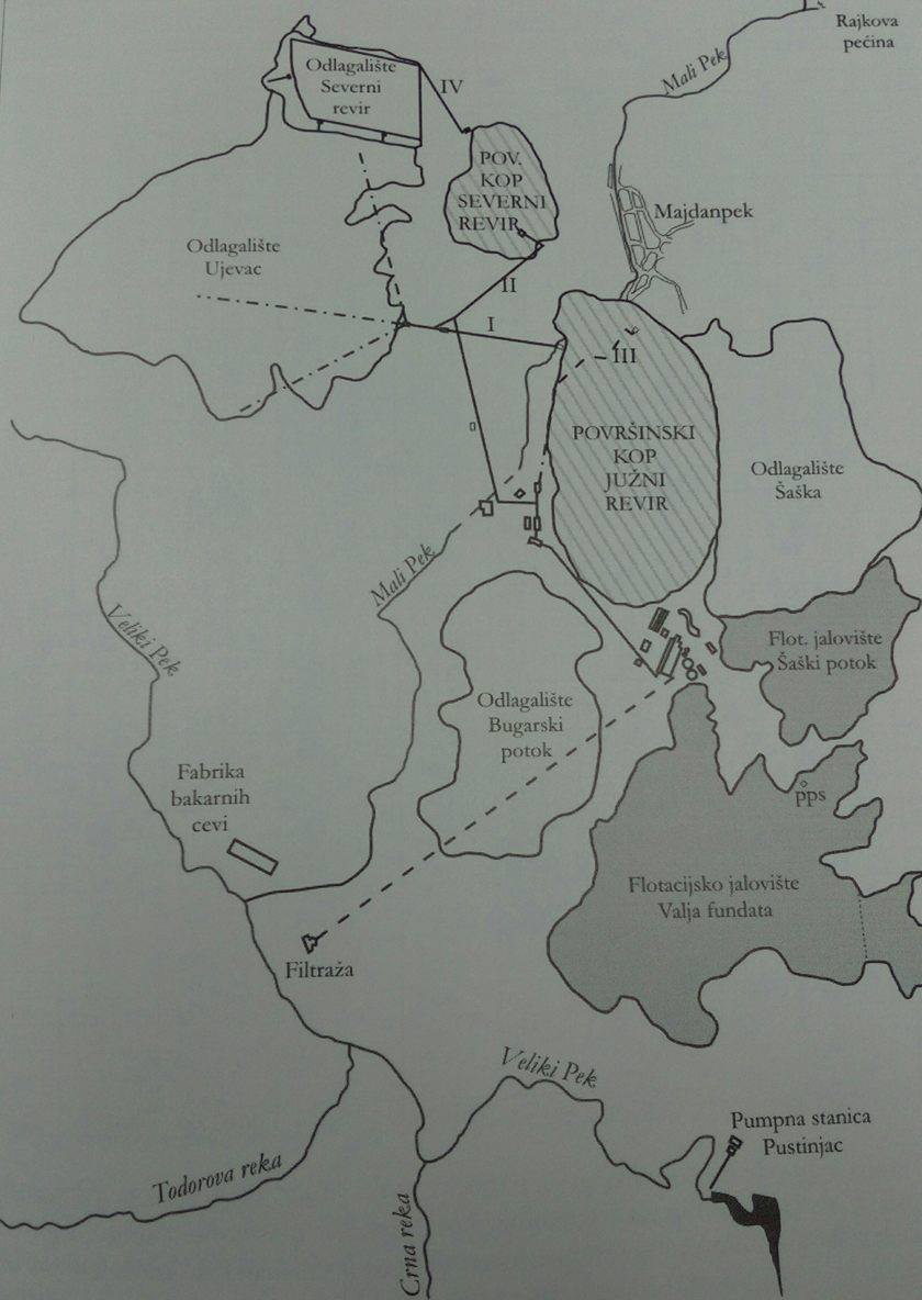 Српски (ћирилица): Објекти рудника бакра Мајданпек